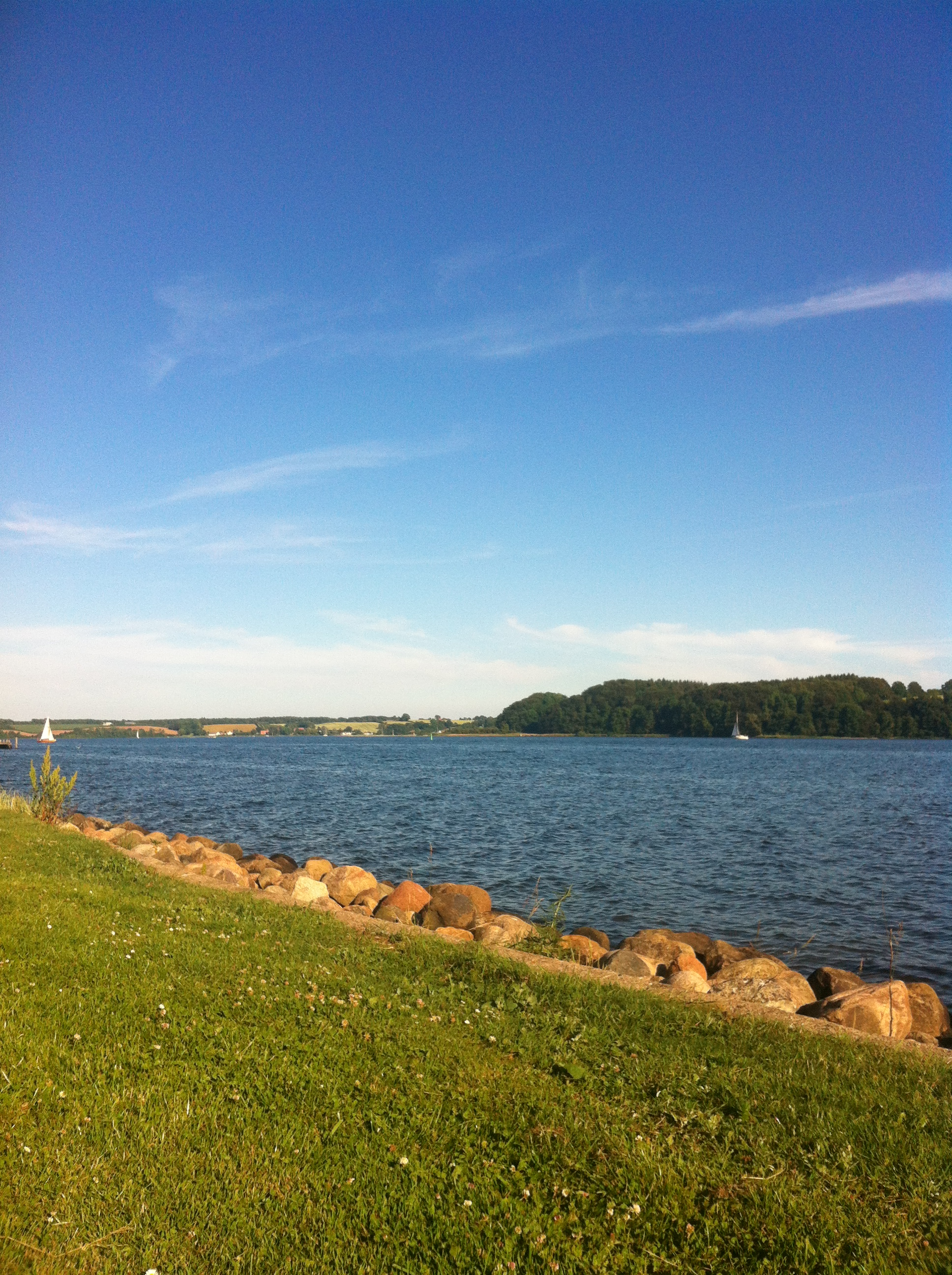 Udsigt over Kolding Fjord fra Dansk Sygeplejehistorisk Museum, juli 2014